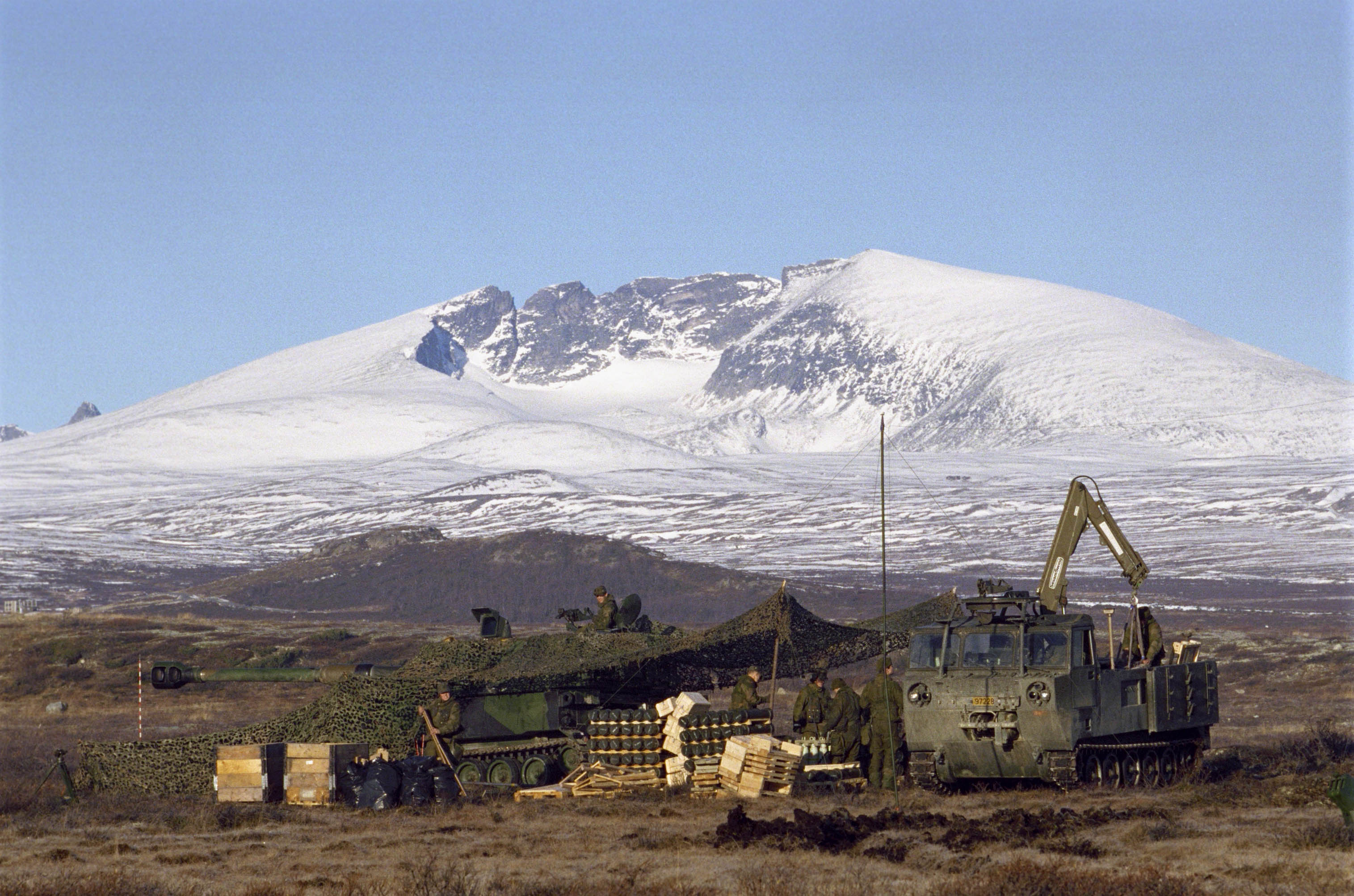 Hjerkinn skytefelt-nå nedlagt